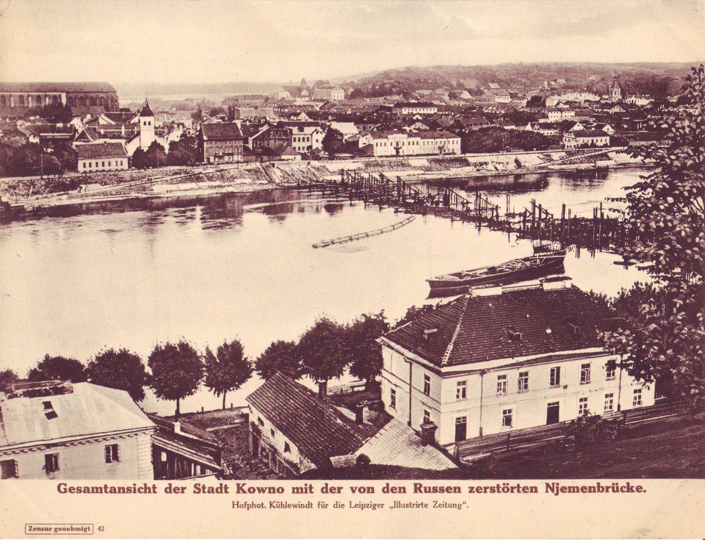 Postkarte